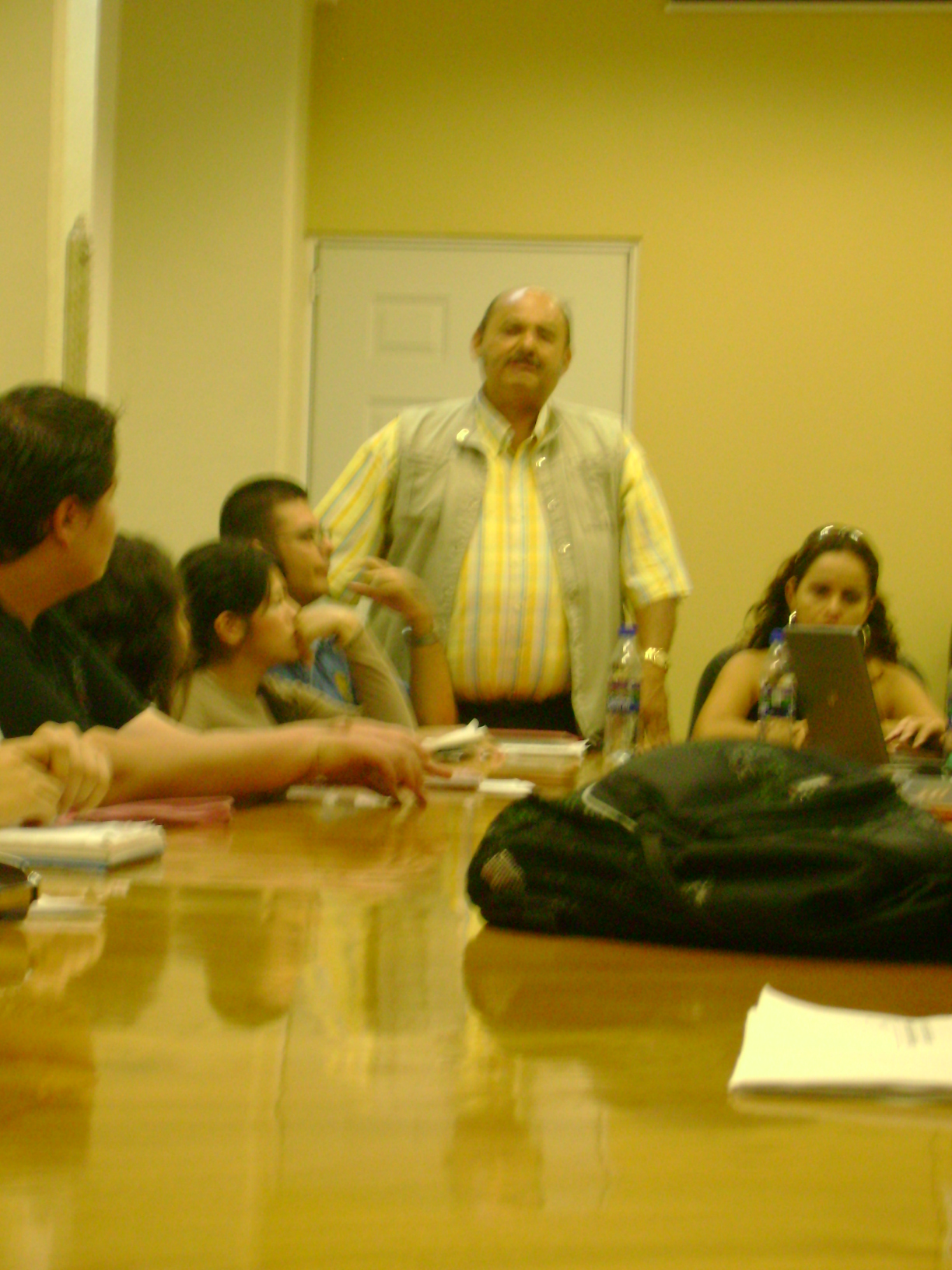 Robeto Chapula de la Mora Robeto Chapula de la Mora en el H. Congreso de Colima frente a alumnos de la Facultad de Derecho de la Universidad de Colima, México.